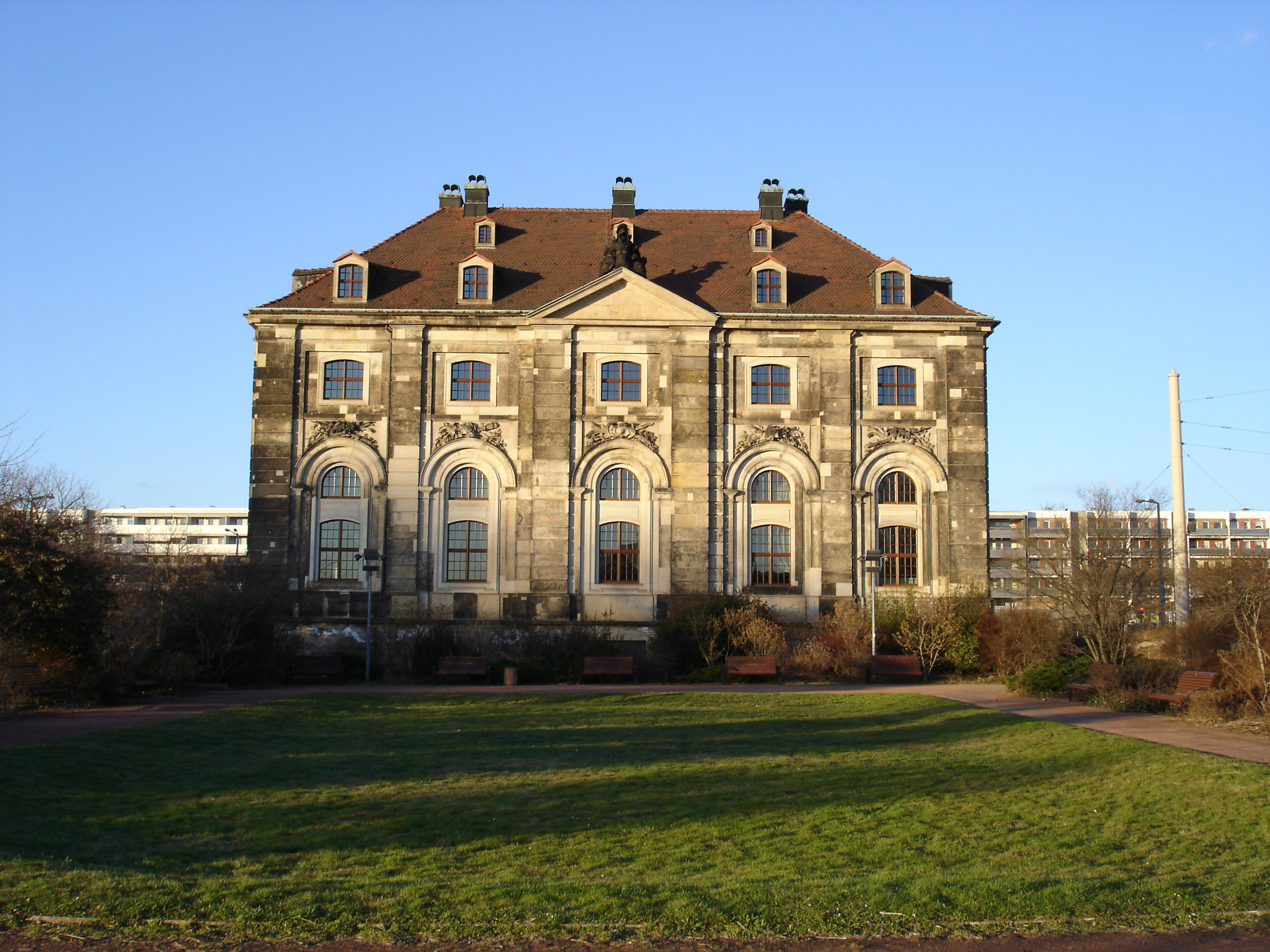 Dresden: Blockhaus, vom Elbufer her gesehen